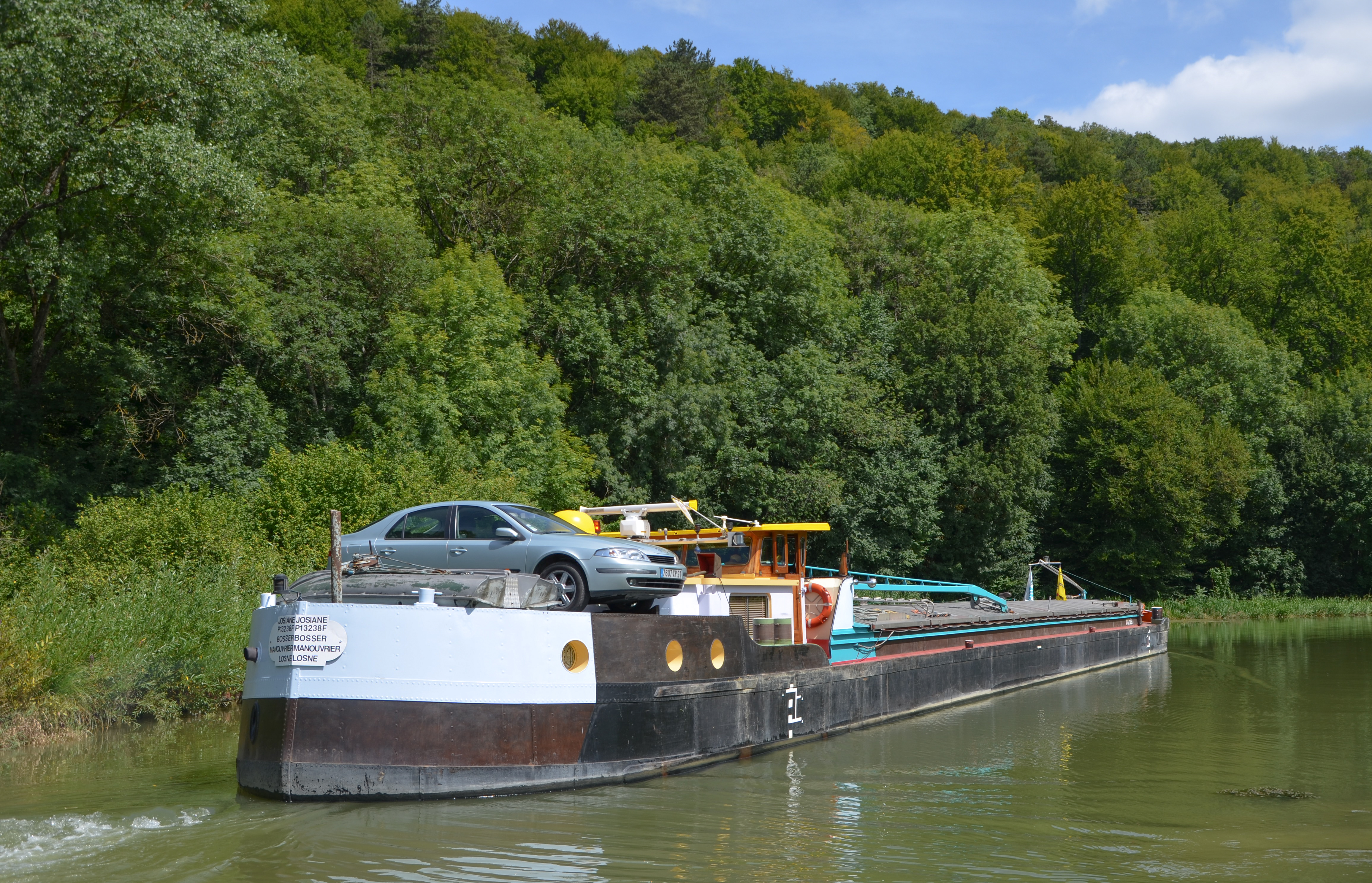 Péniche sur le canal de la Marne à la Saône près de Foulain, Haute Marne, France